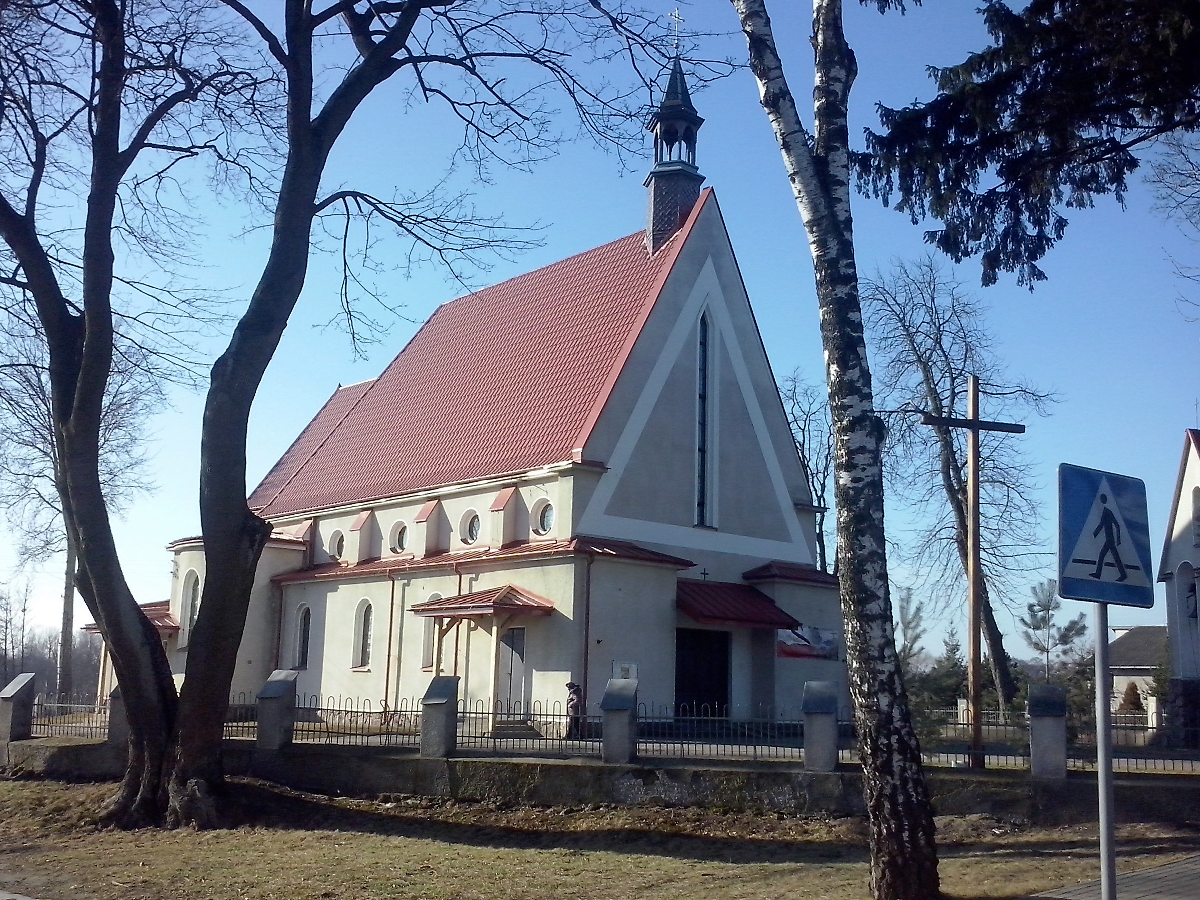 Kamienica (gm. Załuski, pow. Płońsk) - kościół Opatrzności Bożej